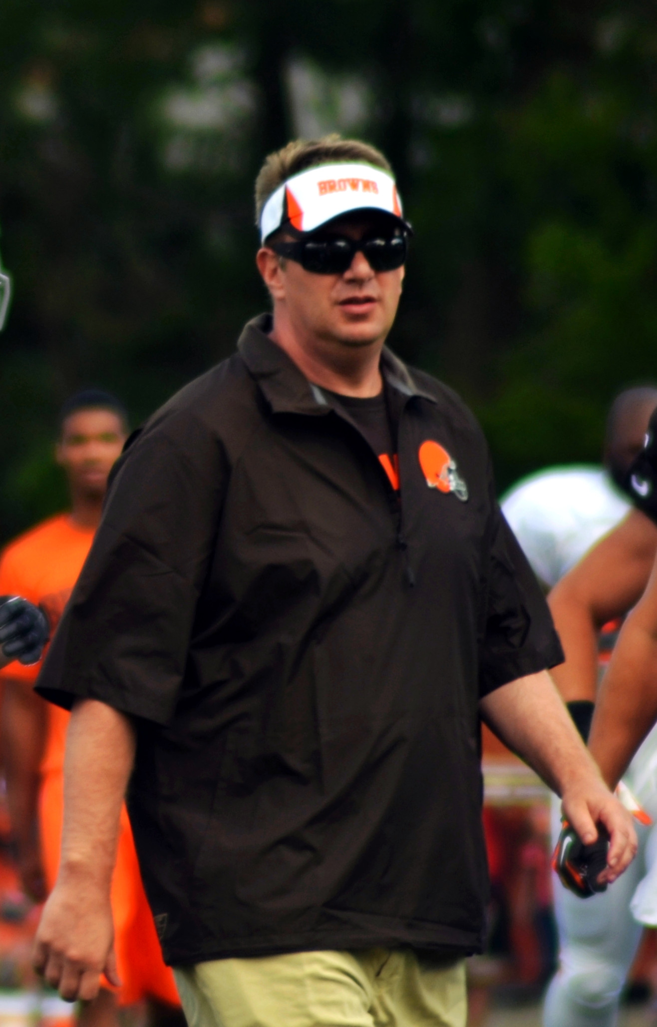 Rob Chudzinski